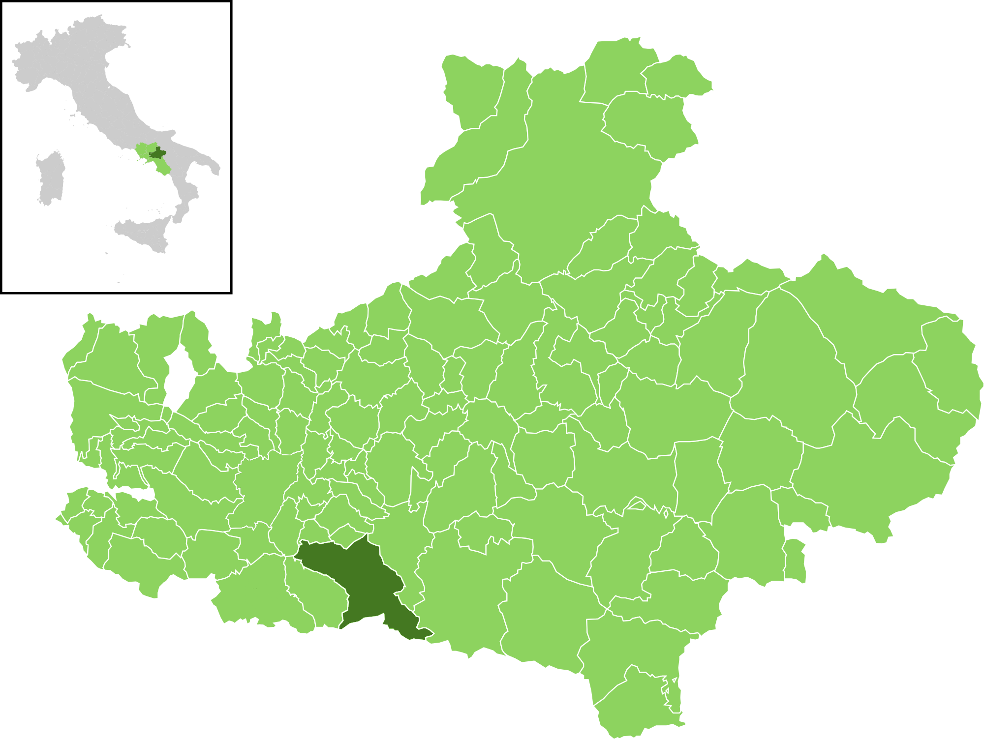 Posizione del comune all'interno della provincia di Avellino